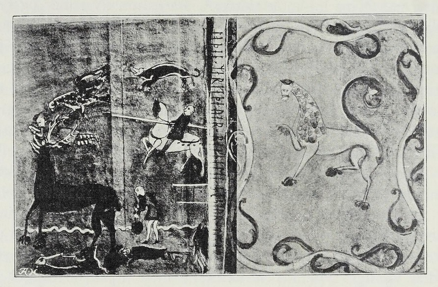 Antependium fra Bilden (stav)kirke, tegnet av Peder Alfsøn i 1627. Fra «Hadeland. Bygdenes historie 1» (1932), s. 268.